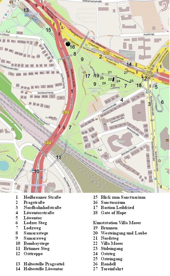 Leibfriedscher Garten, Stuttgart, Lageplan (OpenStreetMap ergänzt).